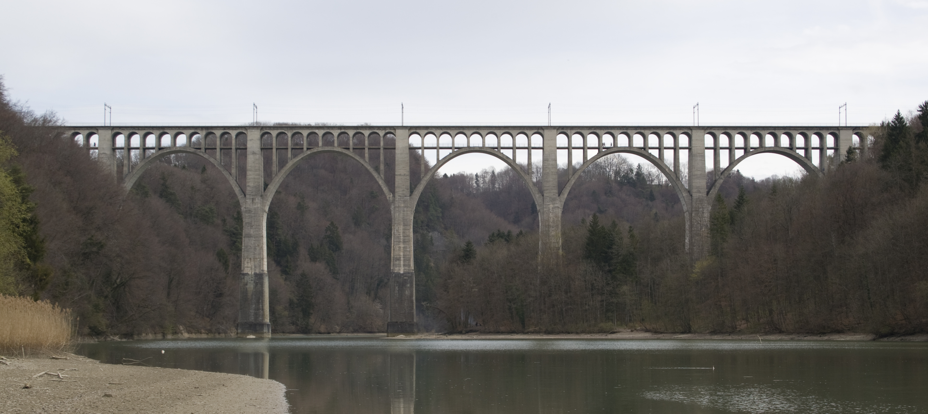 Pont ferroviaire de Grandfey à proximité de Fribourg en Suisse.